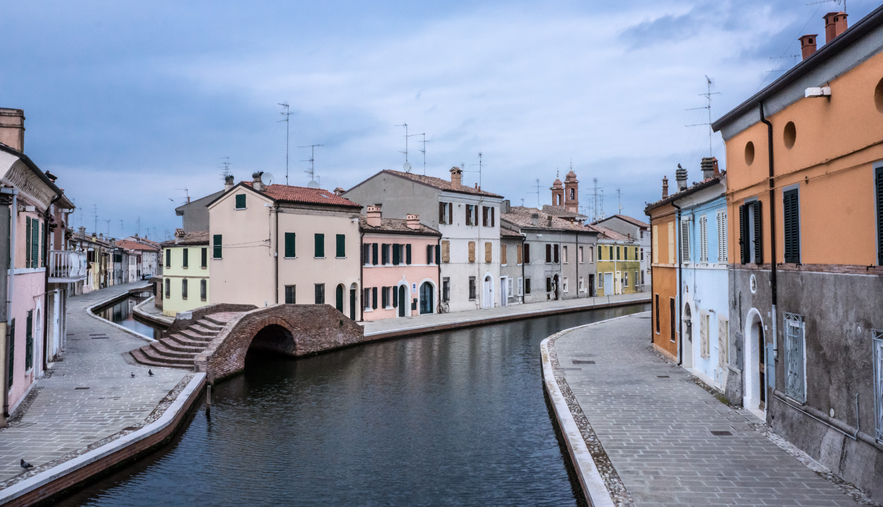 Centro storico di Comacchio e i suoi ponti This is a photo of a monument which is part of cultural heritage of Italy.